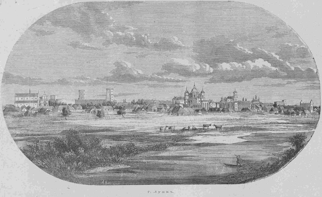 Місто Луцьк у 2 половині 19 століття